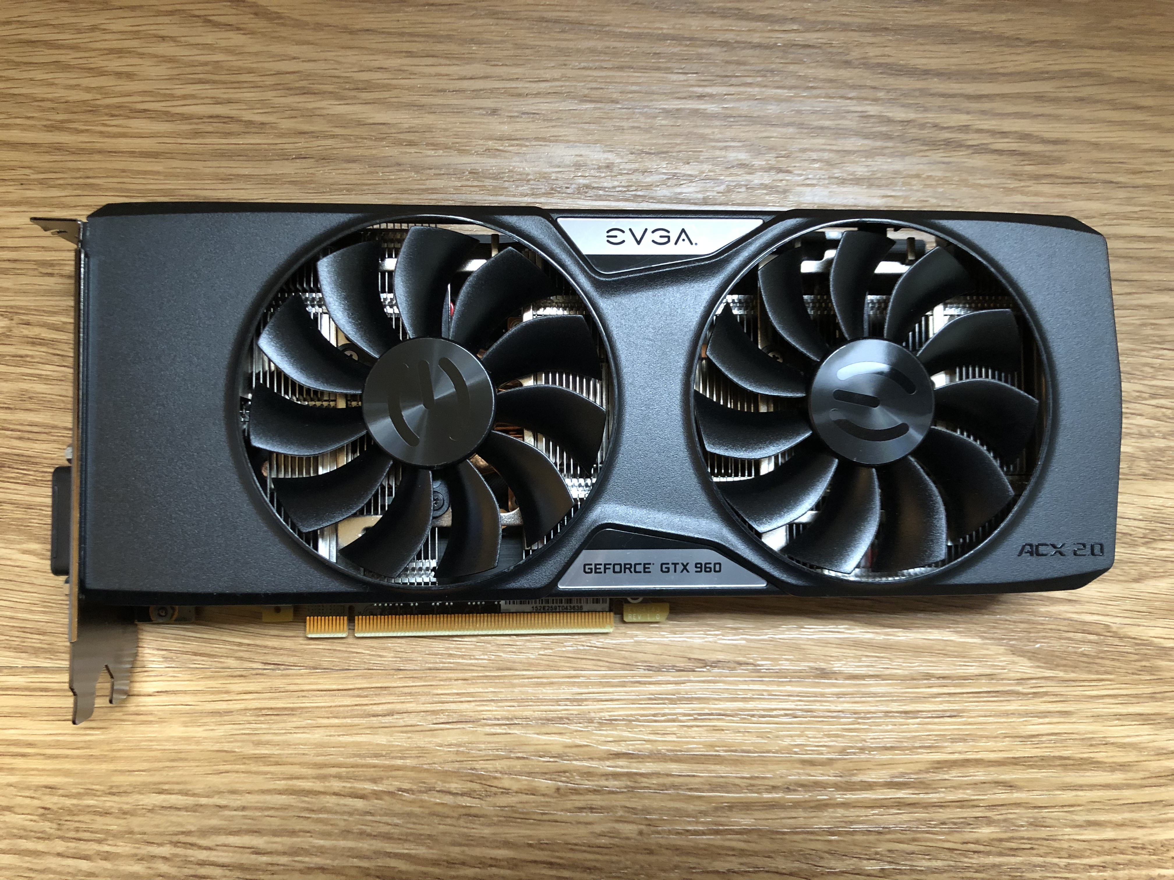 EVGA GTX 960 2GB